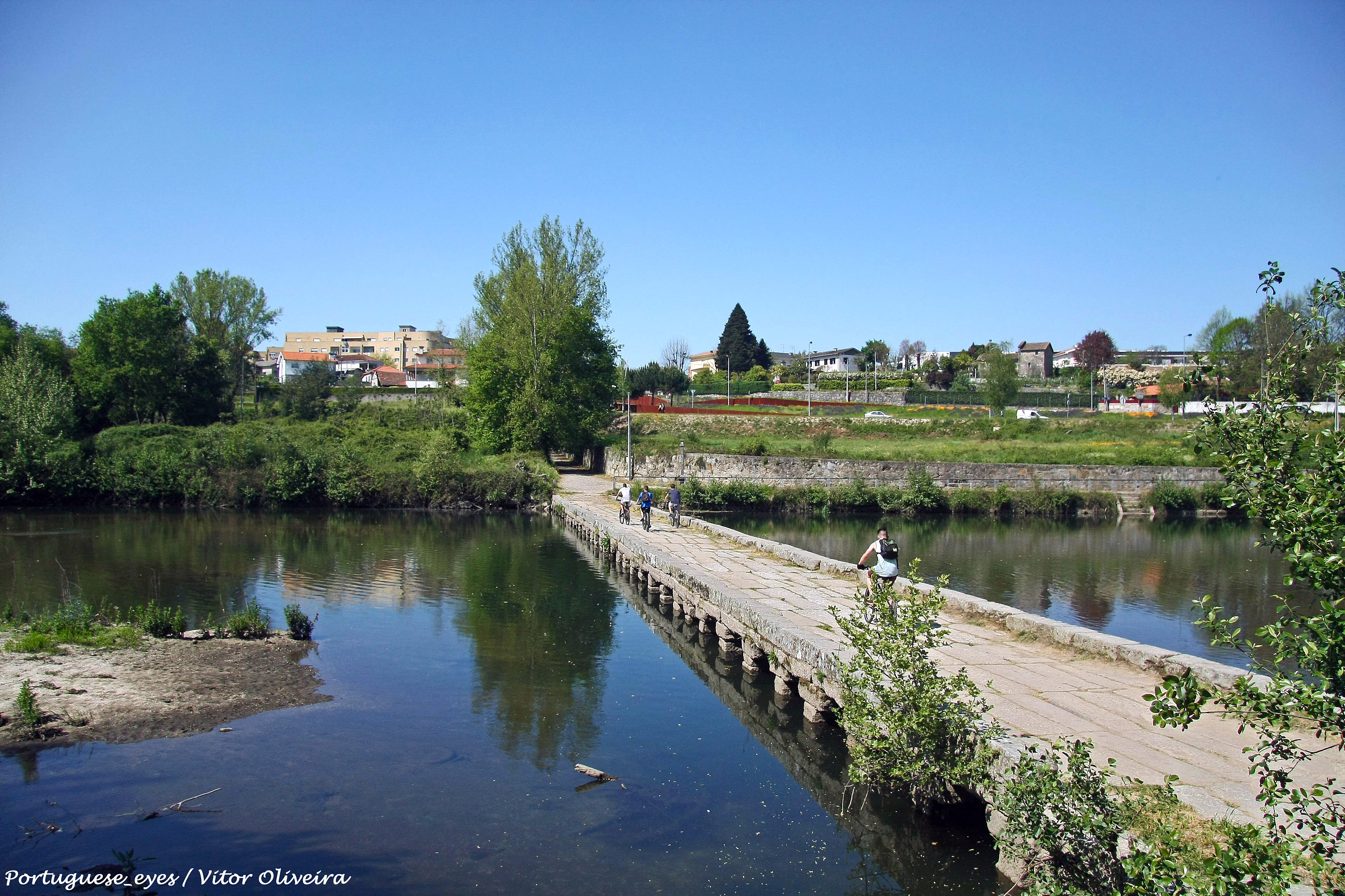 Esta é considerada a ponte mais baixa que atravessa o Rio Ave. Pode encontrar um tipo de ponte prancheira, frequente em rios de baixo volume, datada de finais do séc.XVI / XVII (Idade Moderna). A ponte romana das Taipas foi nos tempos romanos essencialmente estratégica e administrativa e já na Idade Média era considerada via pública, que ligava povoações próximas. Hoje em dia é um local de visita, espelhado nas águas do Rio Ave e emoldurado pela vegetação verdejante.